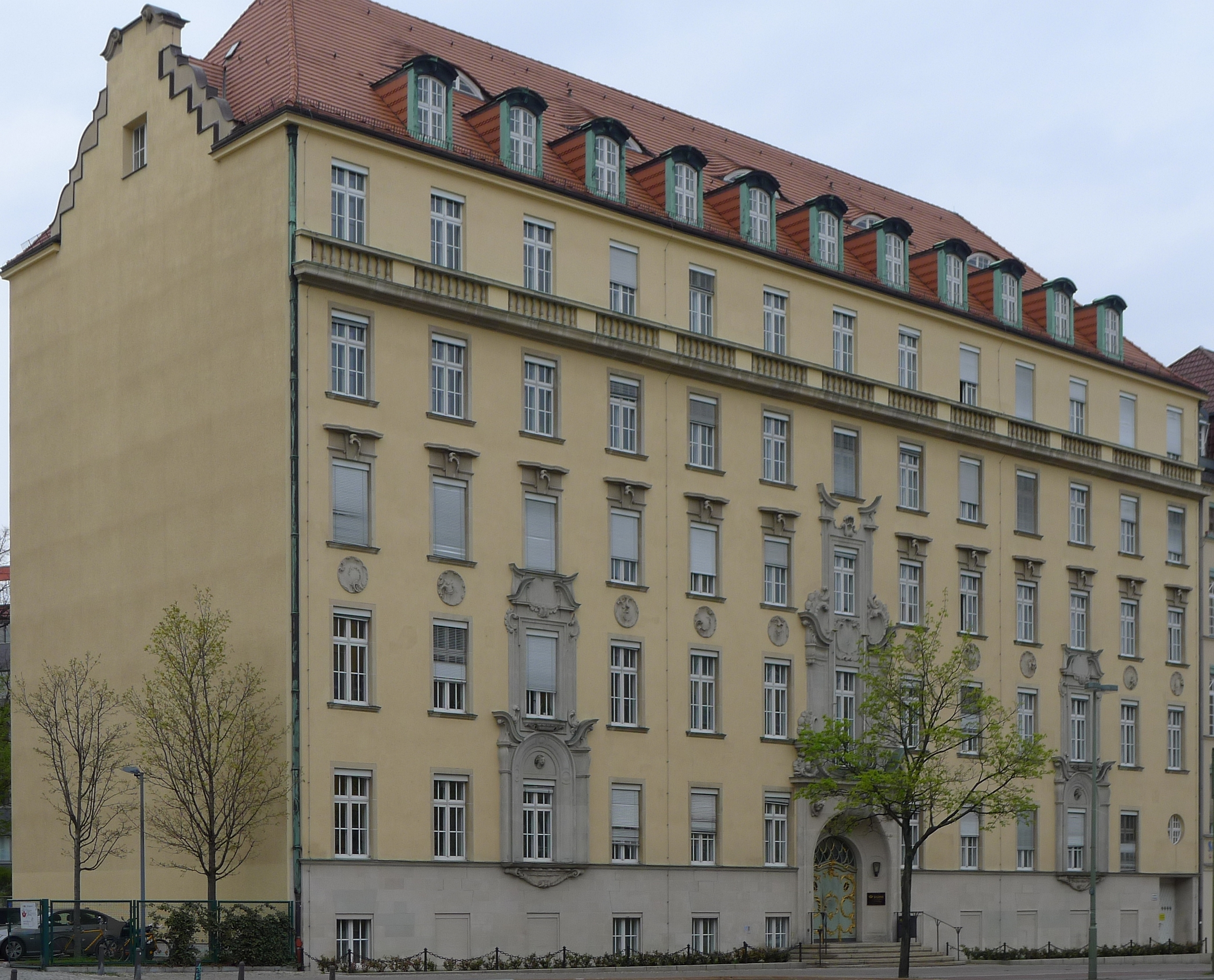 Geschäftshaus